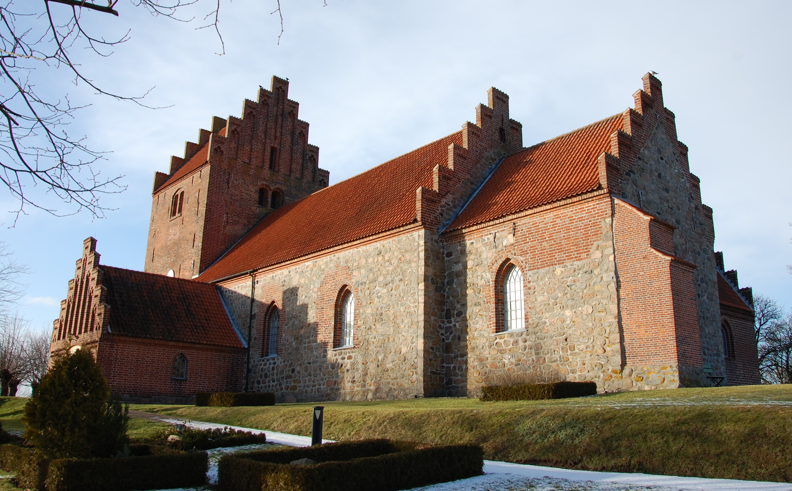 Kirche von Hojby